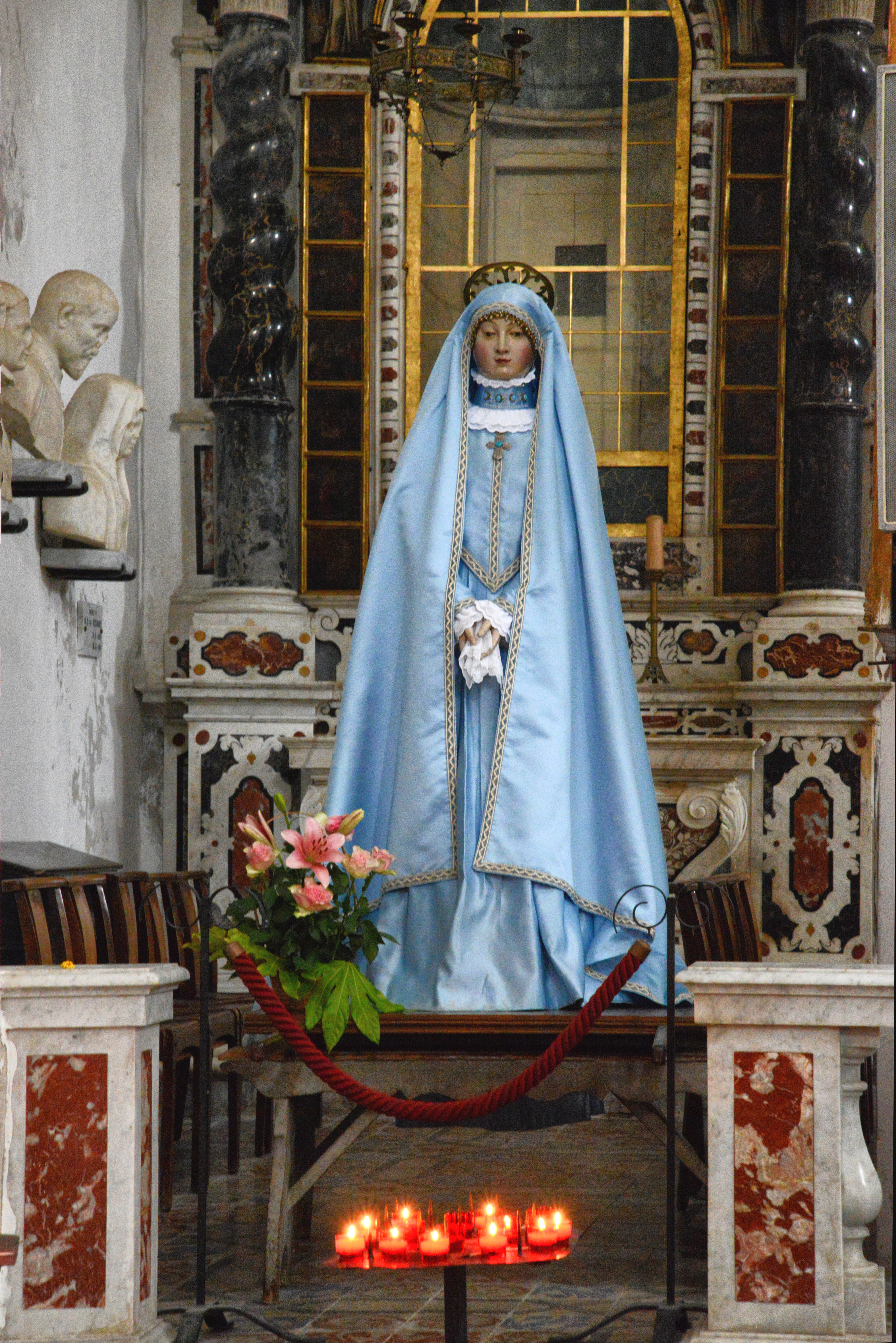 Calvi, Balagne (Corse) - Statue de procession (statue-mannequin) Vierge à l'Enfant dite Vierge du Rosaire dans la cathédrale Saint-Jean-Baptiste